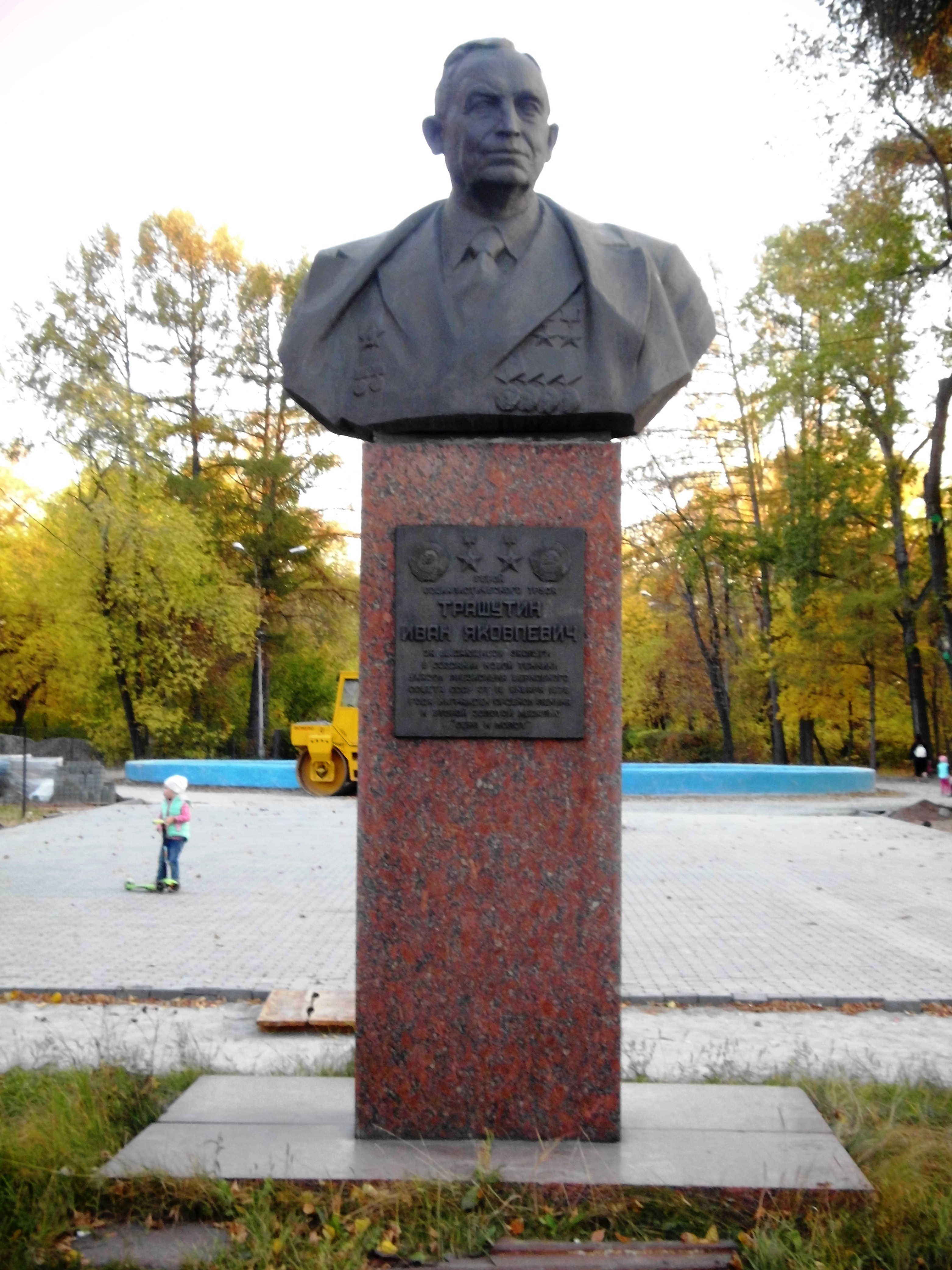 Бюст Героя Социалистического Труда Трашутина И. Я.: проспект Ленина (детский парк Терешковой у Комсомольской площади), Челябинск, Челябинская область. На момент съёмки в парке проводились реставрационные работы.